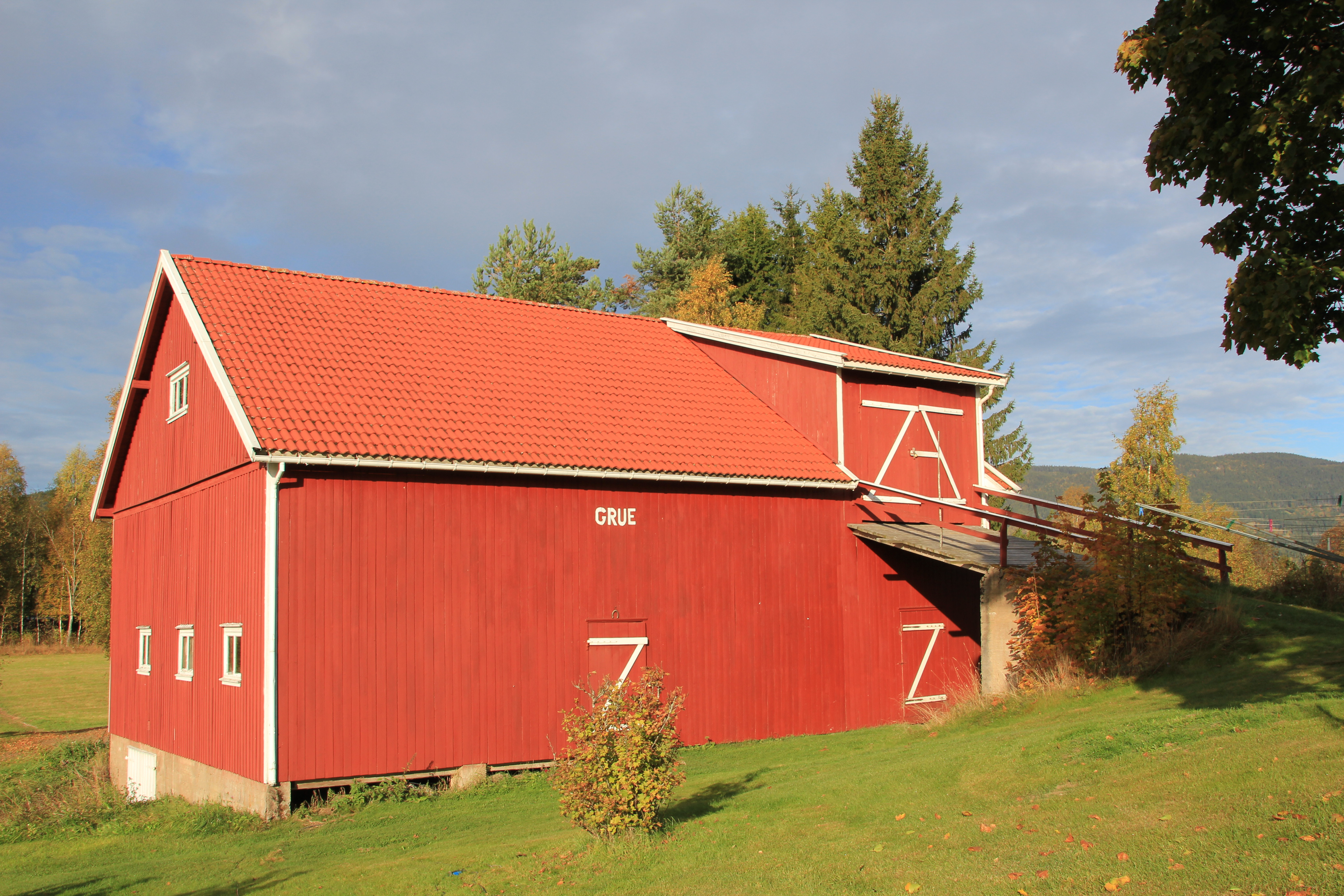 Låven til Grue gård i Hurdal.